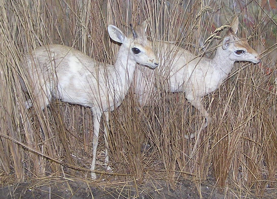 Зоологический музей в Санкт-Петербурге. Рыжебрюхий дикдик (cutted image) Identification: We can see Madoqua phillipsi on the pedestal = Madoqua saltiana phillipsi